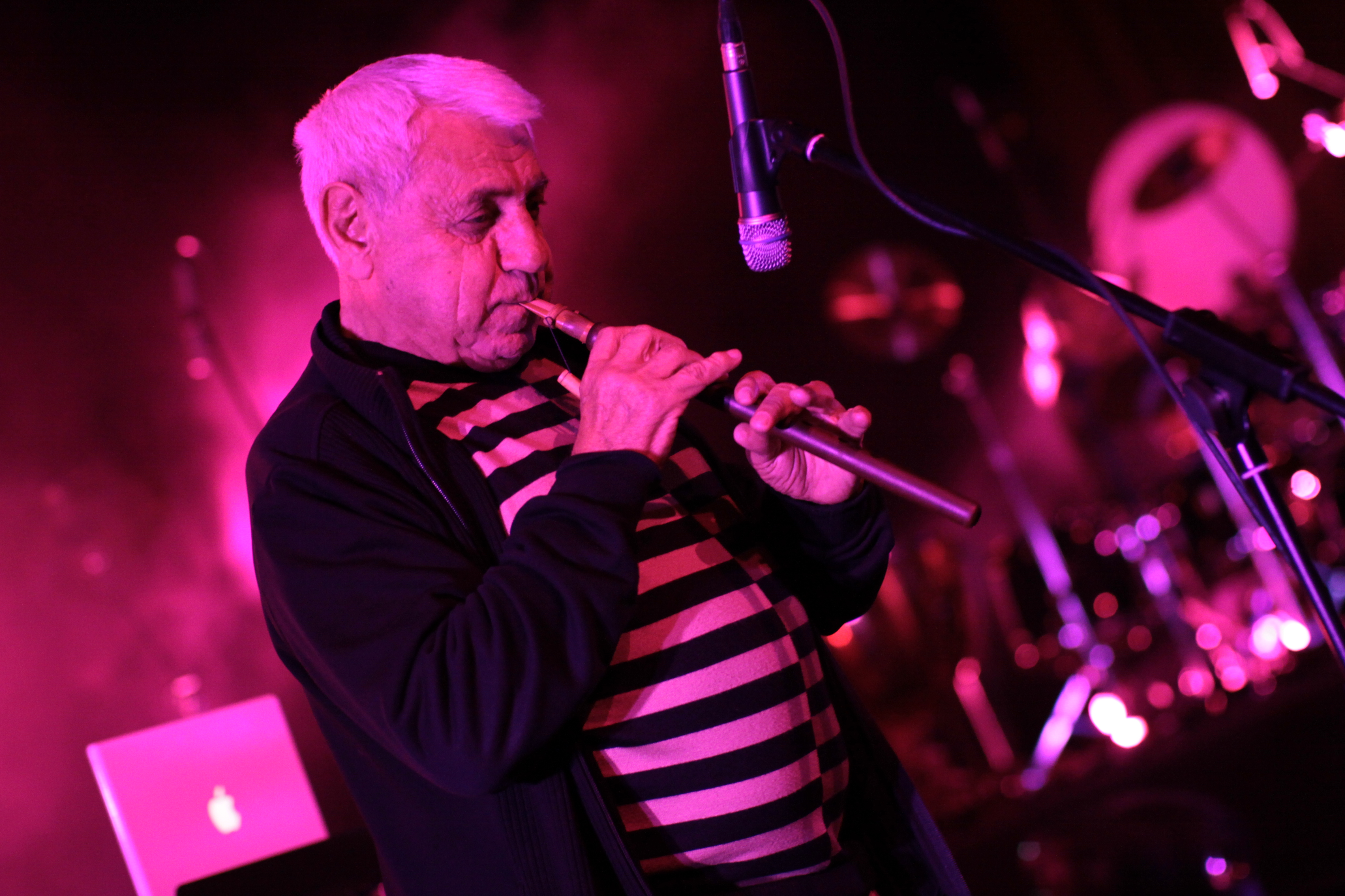 Djivan Gasparyan en octobre 2009 lors d'un concert avec Space